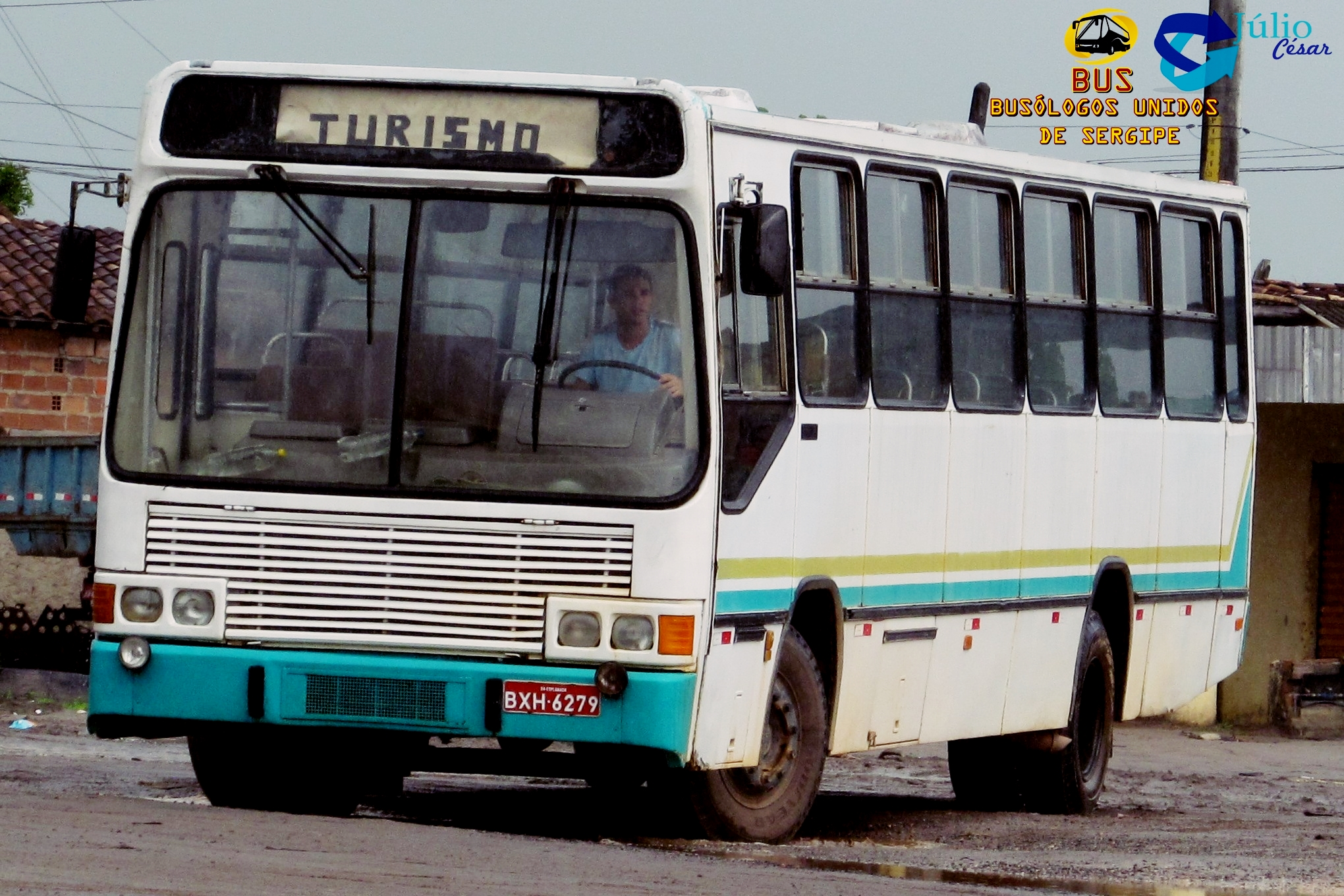 Torino LN, empresa particular em Esplanada-BA